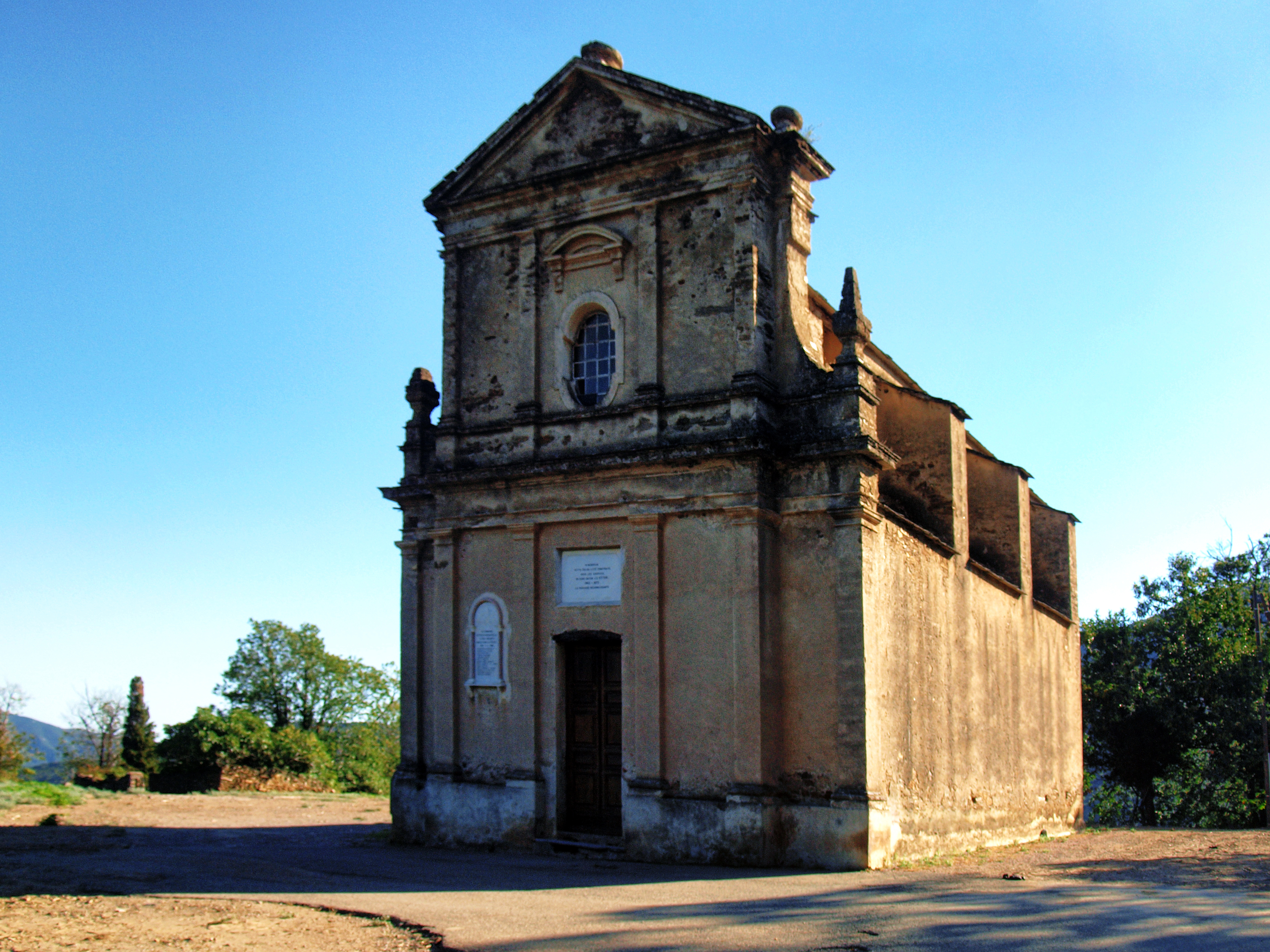 Penta-Acquatella, Castagniccia (Corse) - Église paroissiale de la Nativité de la Vierge construite en 1862 à Pieve, à l'emplacement d'une ancienne église dédiée à l'Assomption.